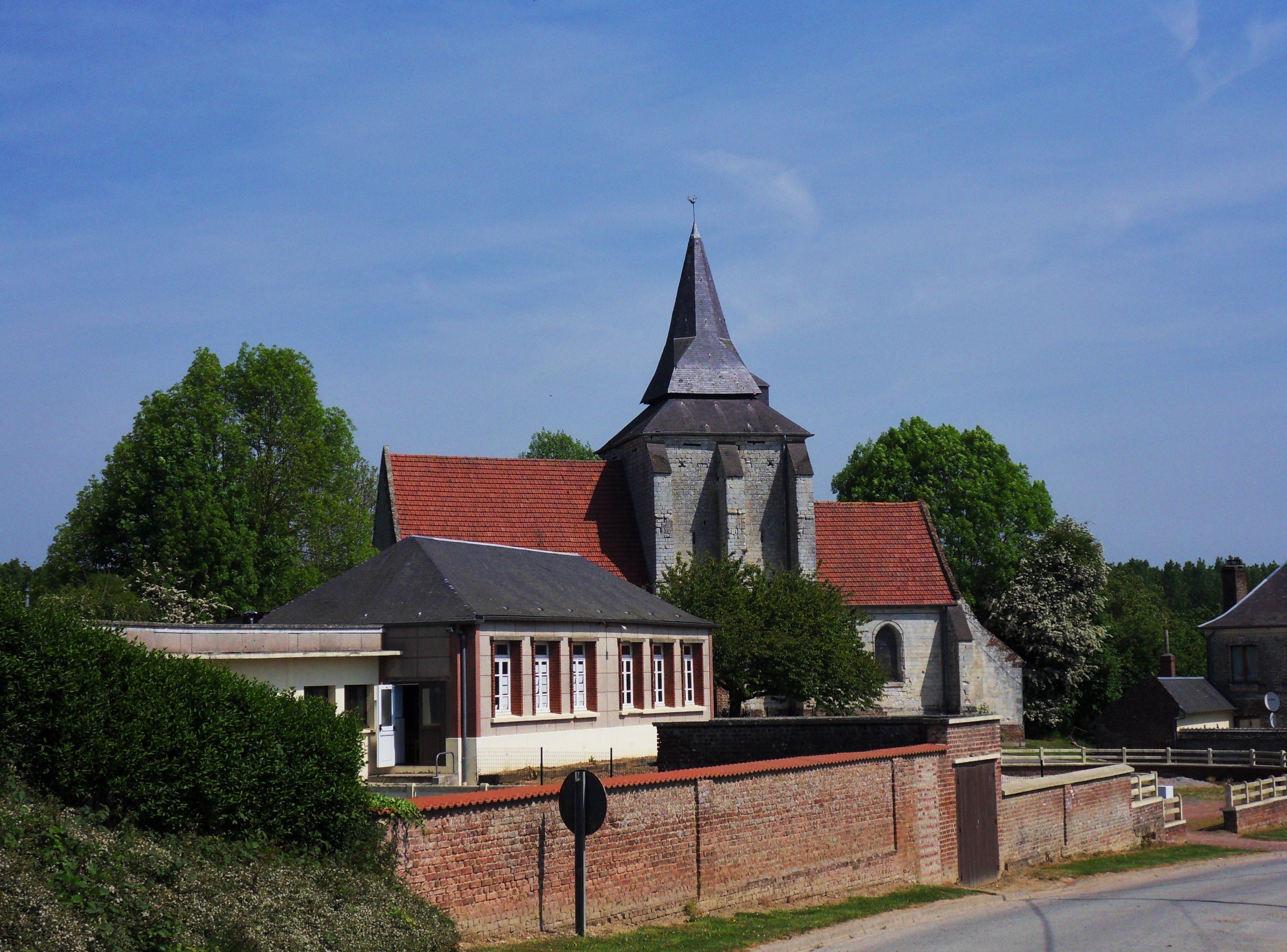 Sarton, Pas de Calais, France